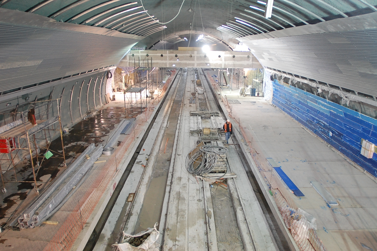 Vista de la estación Plaza de Maipú de la Línea 5 del Metro de Santiago